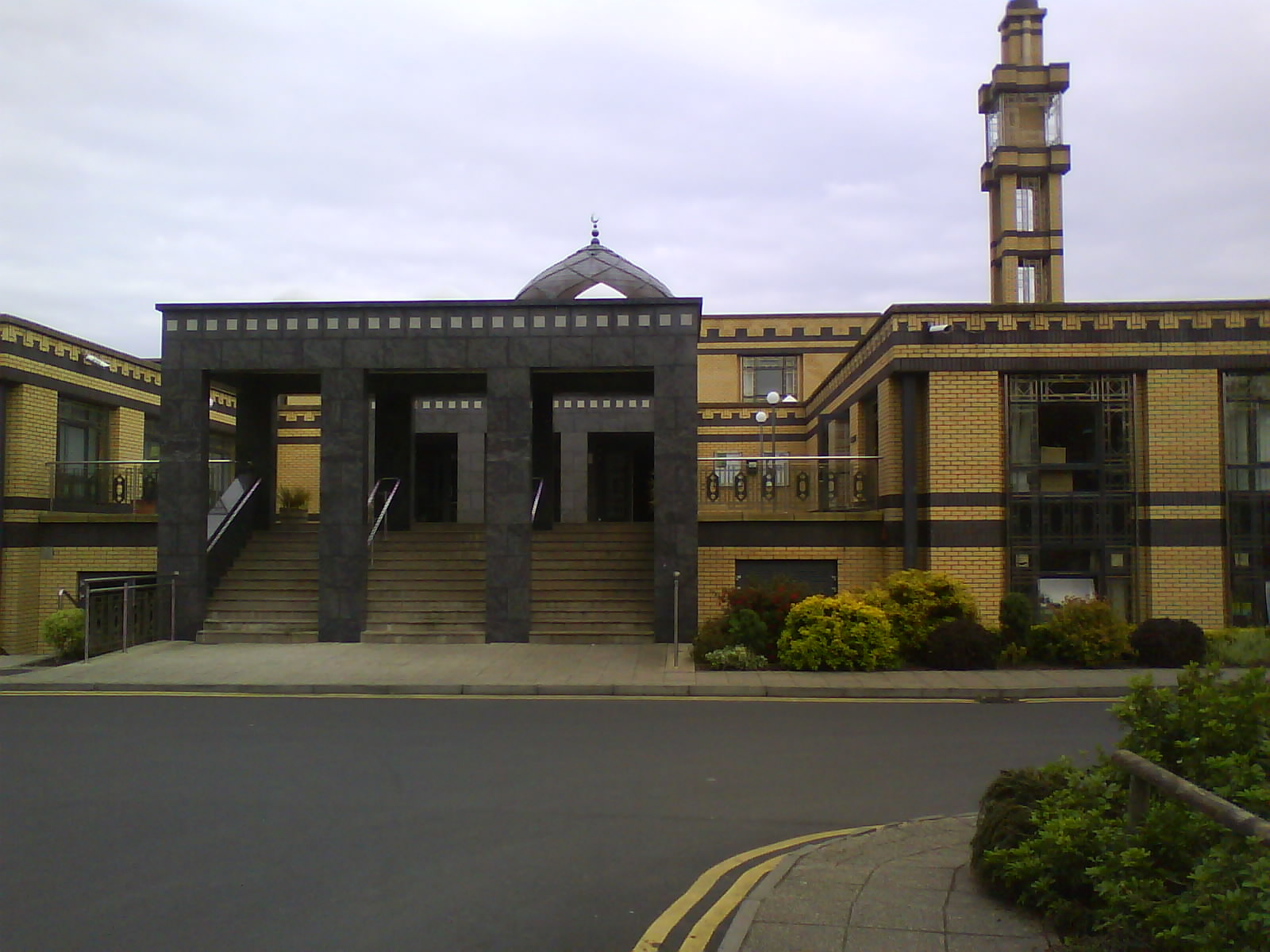 La mosquée clonskeagh à Dublin